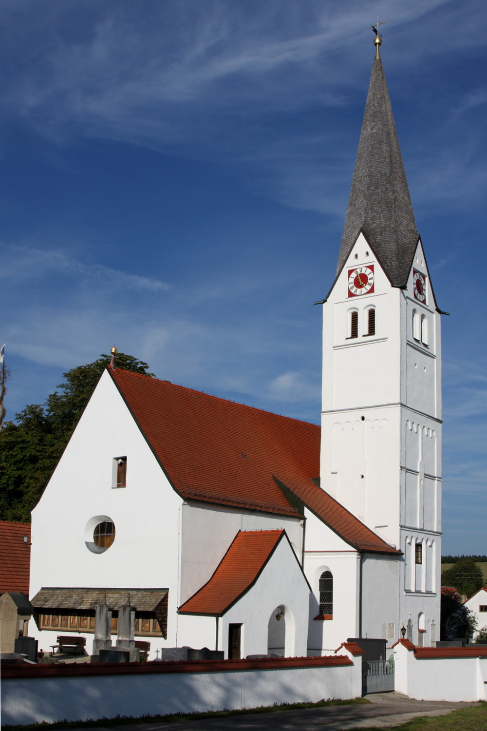 15. JahrhundertThis is a photograph of an architectural monument.